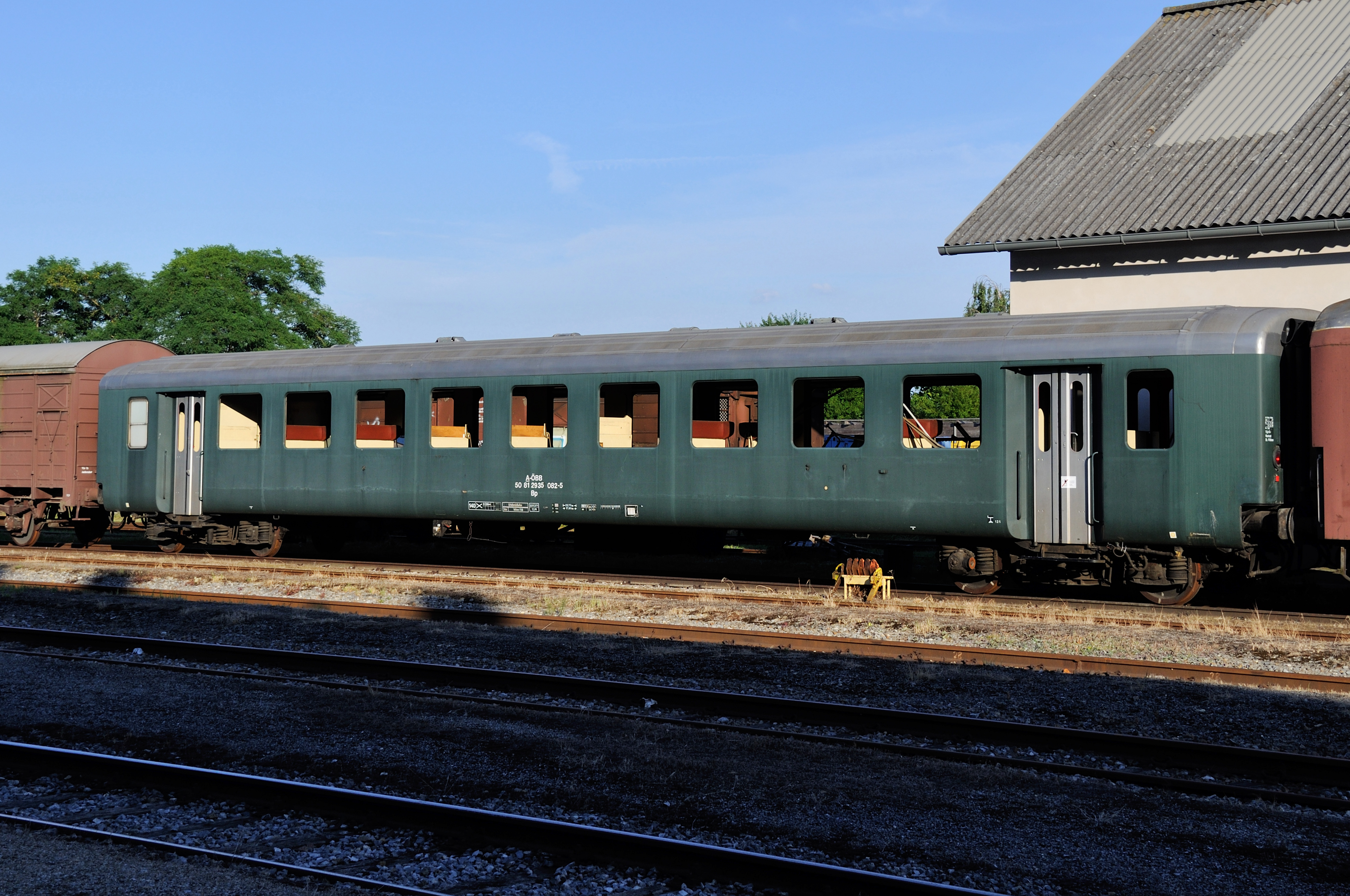 Ehemaliger Schlierenwagen der ÖBB Erlebnisbahn Bp 29-35 082-5 am Mistelbacher Lokalbahnhof.